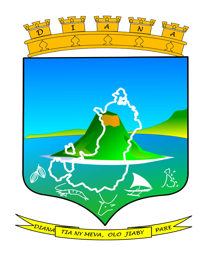 Logo officiel de la Région DIANA